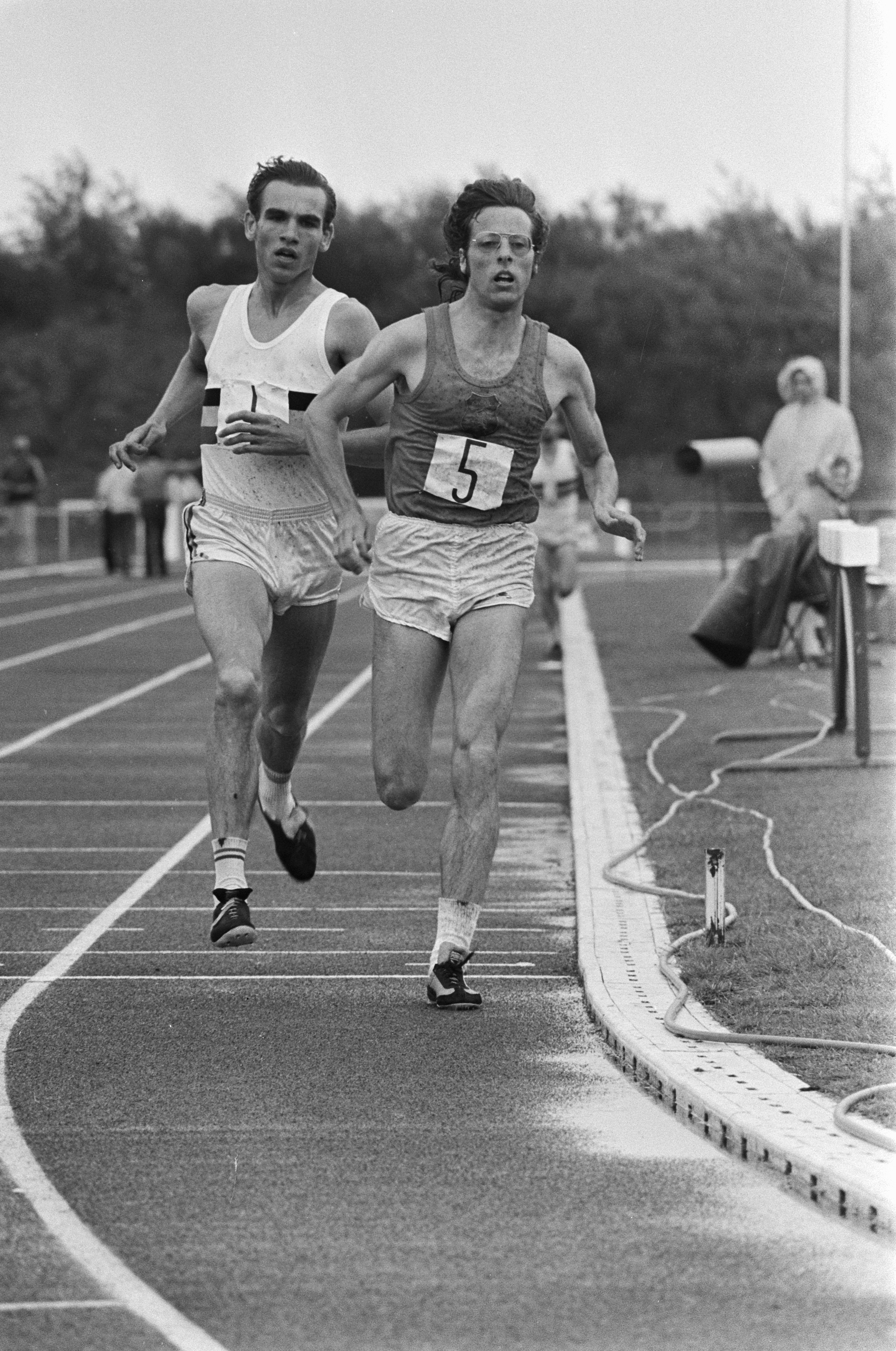 Collectie / Archief : Fotocollectie Anefo Reportage / Serie : [ onbekend ] Beschrijving : Atletiekinterland Nederland, Duitsland B, Belgie op Papendal; Jos Hermens (rechts) en de Belg Schots in actie op 5000 meter Datum : 11 augustus 1974 Locatie : België, Duitsland, Nederland Trefwoorden : atletiek Persoonsnaam : Jos Hermens Instellingsnaam : Papendal Fotograaf : Verhoeff, Bert / Anefo Auteursrechthebbende : Nationaal Archief Materiaalsoort : Negatief (zwart/wit) Nummer archiefinventaris : bekijk toegang 2.24.01.05 Bestanddeelnummer : 927-3806